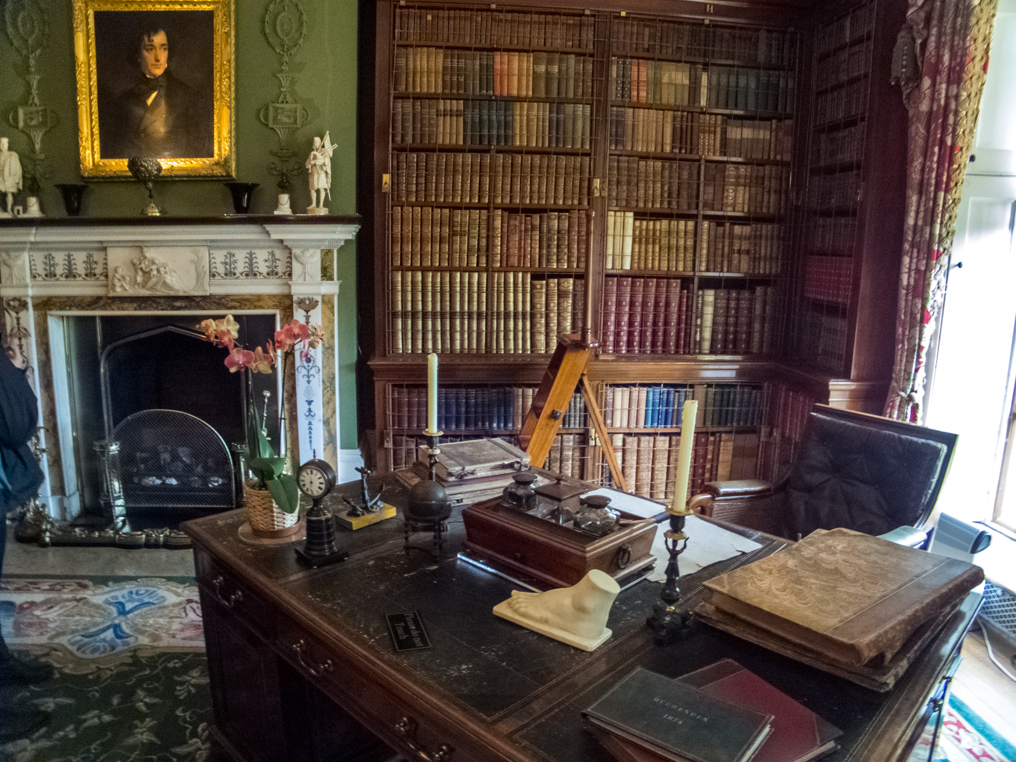 Hughenden Manor